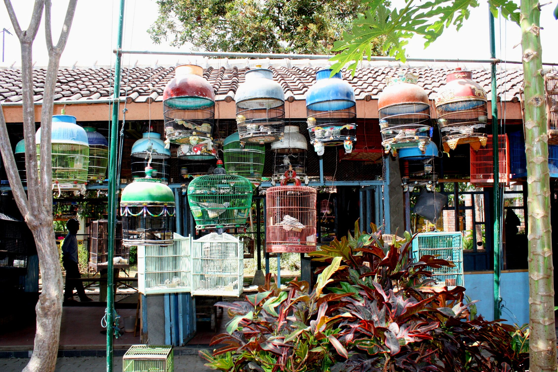 DSC00428/Java/Jogyakarta/Birds Market/Pasar Ngasem